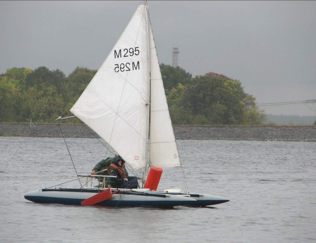 Катамаран Альбатрос на новых баллонах из ПВХ, участник регаты на Пироговском вдхр.